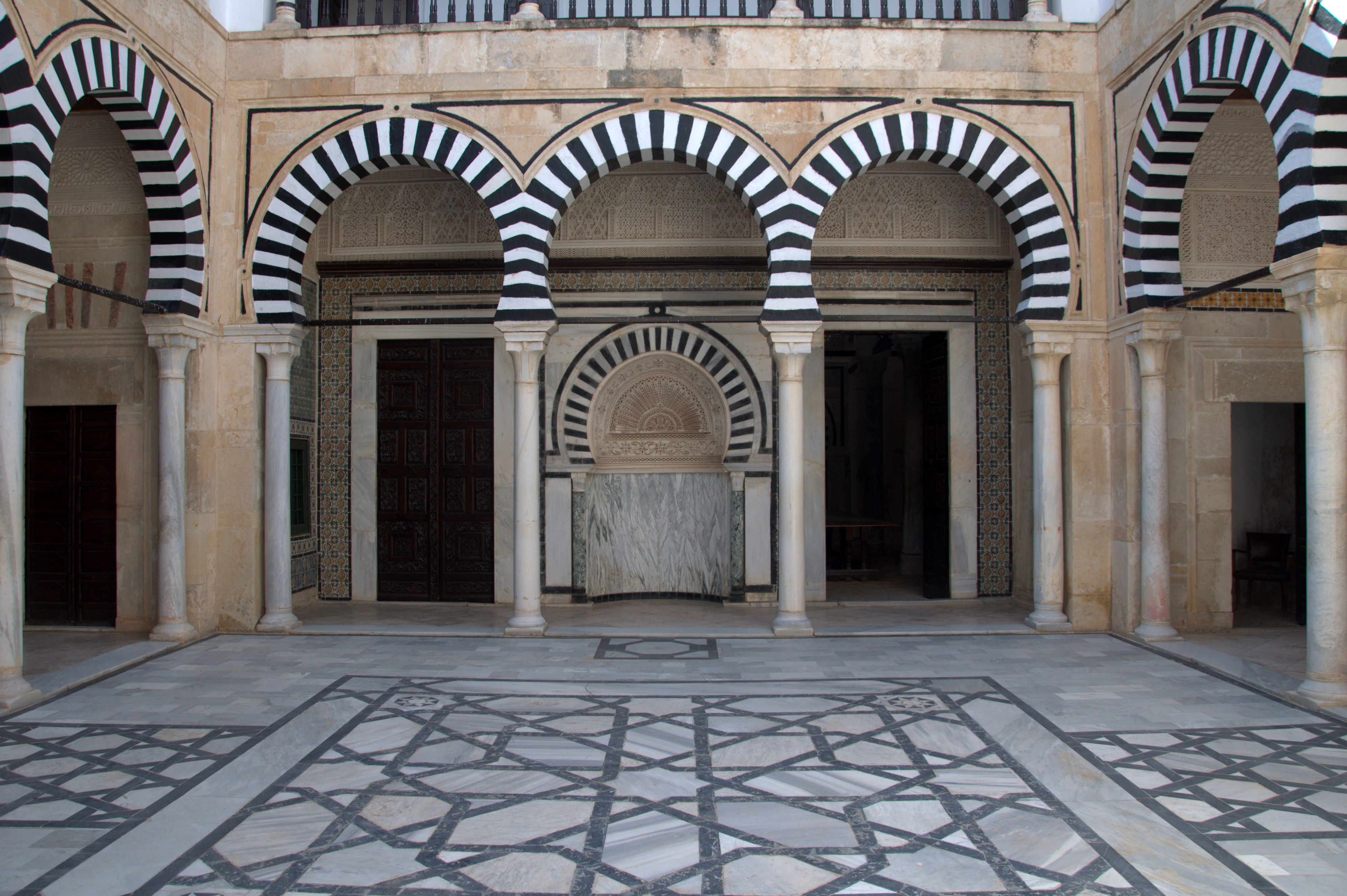 Zaouï de Sidi Abid El Ghariani à Kairouan (Tunisie)